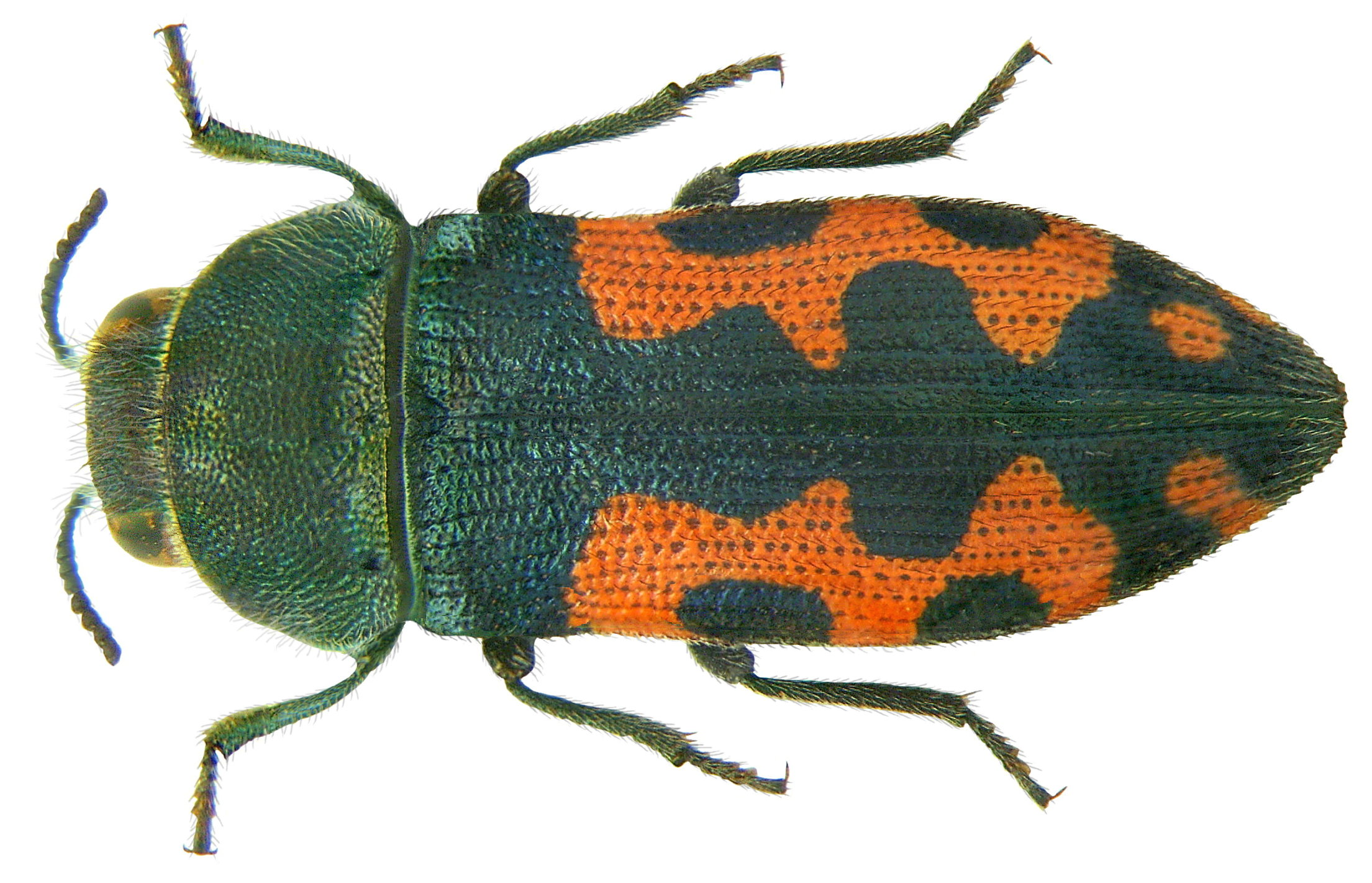 Familie: Buprestidae Grösse: 8,2 mm Fundort: Türkei, Prov. Mersin, Mersin, Yeniköy leg. A.Skale, 2002; det. M.Niehuis, 2002 Foto: U.Schmidt, 2009